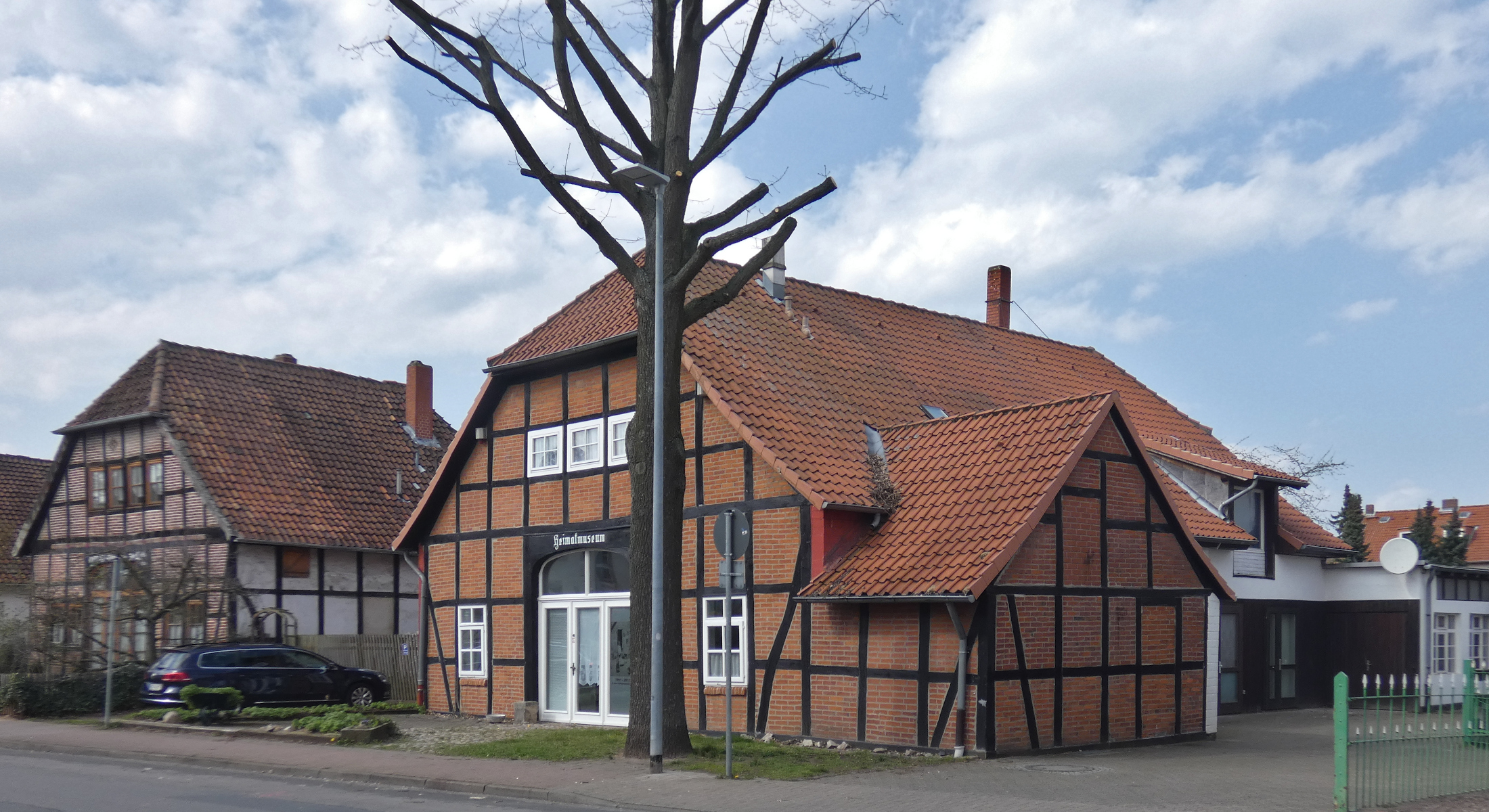 Bis 2018 beherbergte das Gebäude Im Sande 14 im Stadtteil Letter das Heimatmuseum der Stadt Seelze.Wie das Gebäude Im Sande 16 dahinter gehört es zu einer Mitte des 19. Jahrhunderts.errichteten Reihe von vier denkmalgeschützten Vierständern